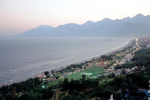 Antalya